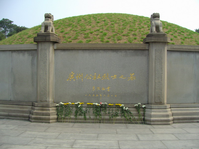 广州烈士陵园内的广州起义烈士之墓